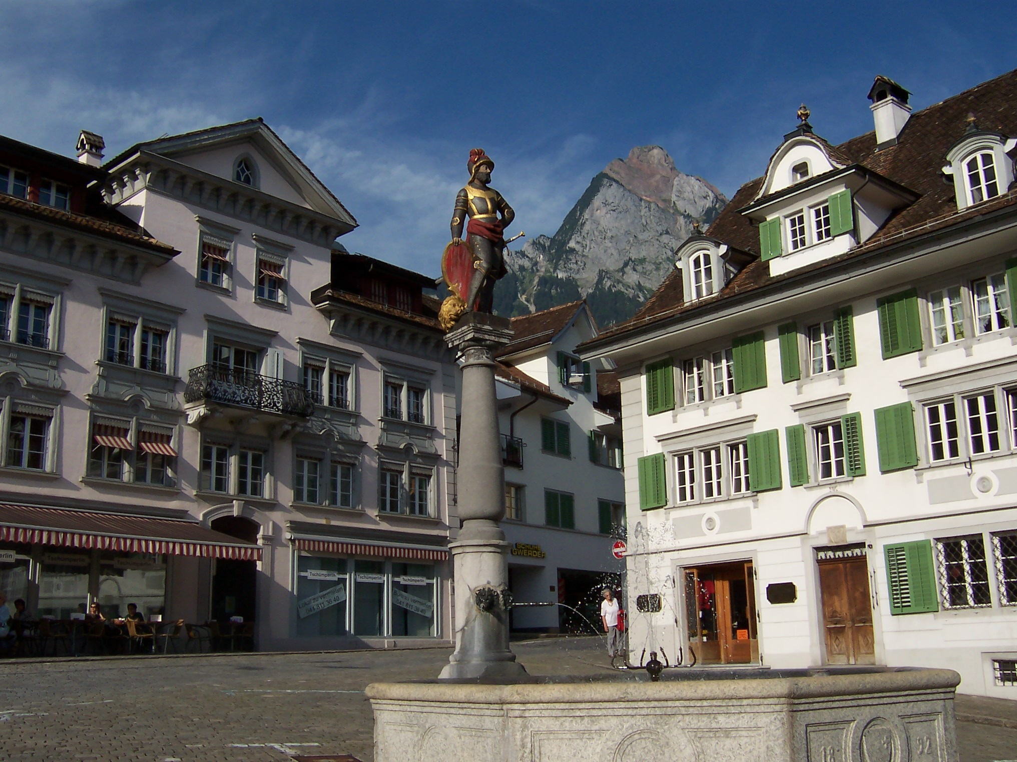 Schwyz, Brunnen-Mändl am Hauptlpatz